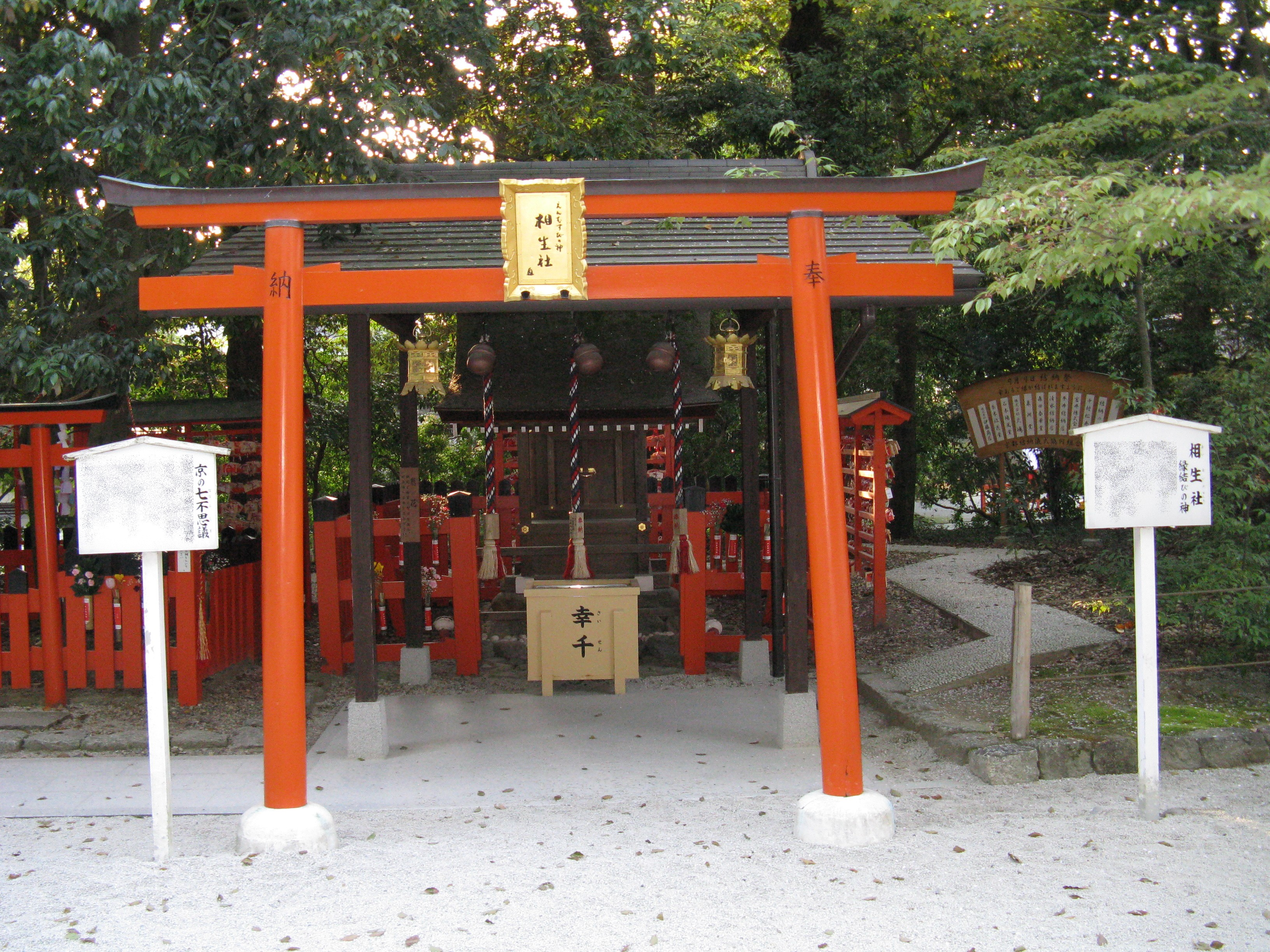 賀茂御祖神社（下鴨神社） 相生社